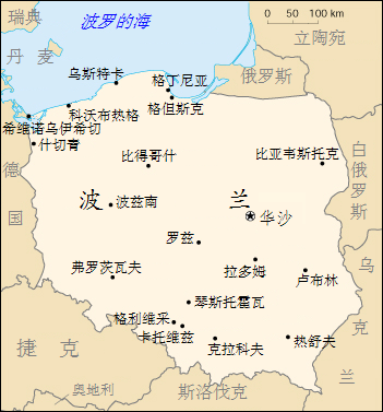 波兰地图，修改